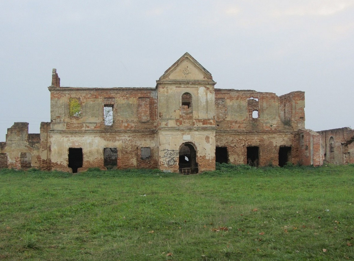 Бяроза. Кляштар